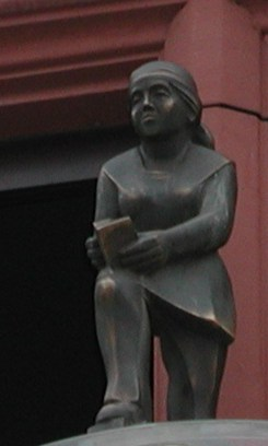 Die symbolische Trümmerfrau aus dem Glockenspiel